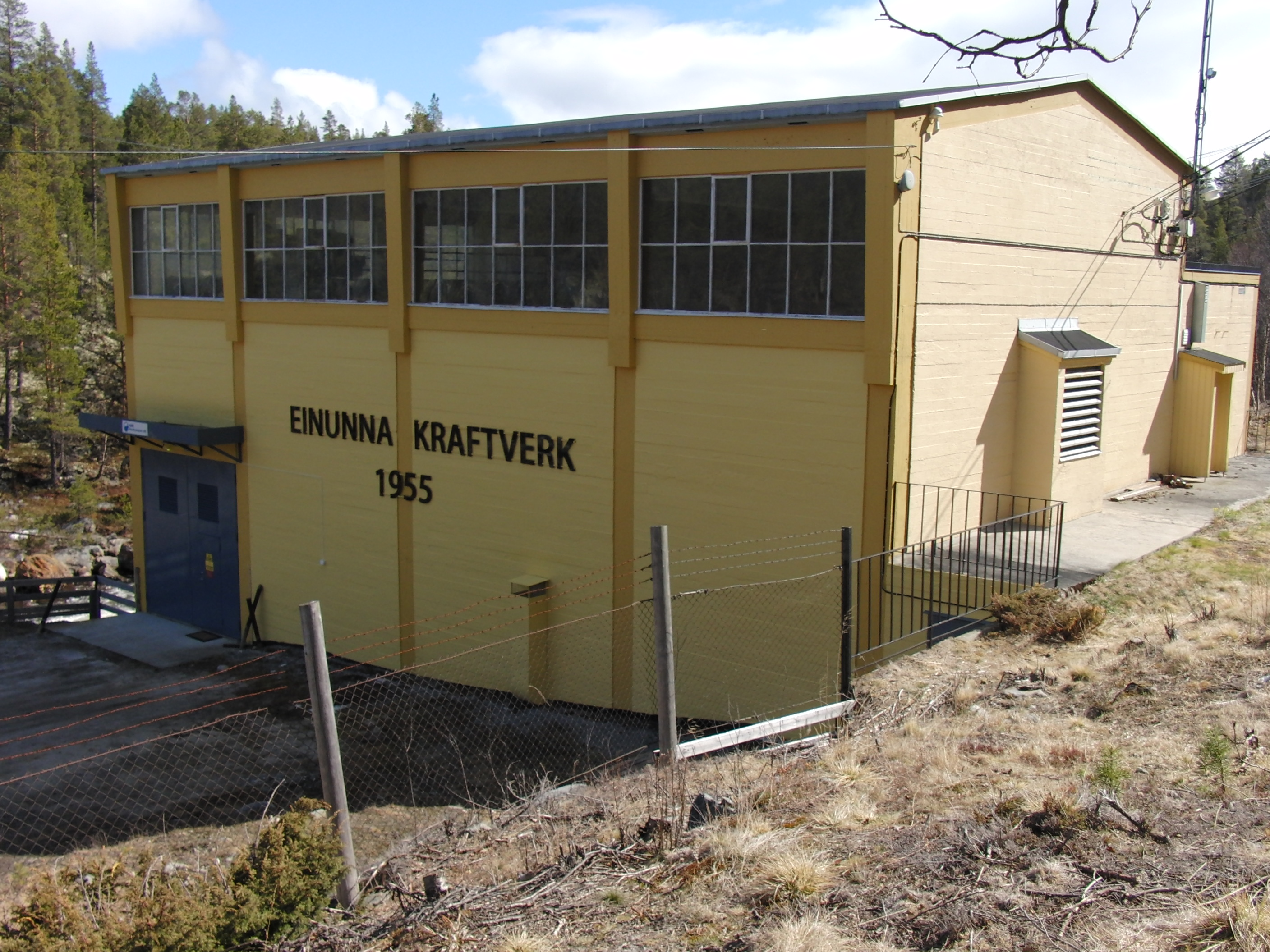 Einunna kraftverk